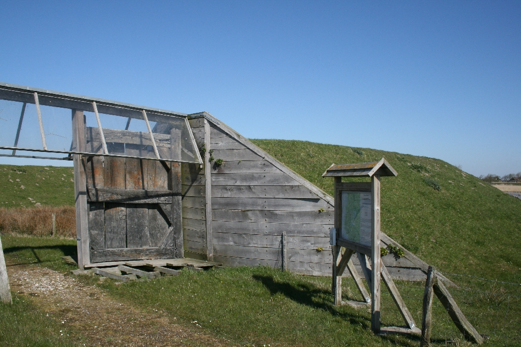 gate of a lock (1566) (Deichbaumuseum Neukirchen (Nordfriesland))